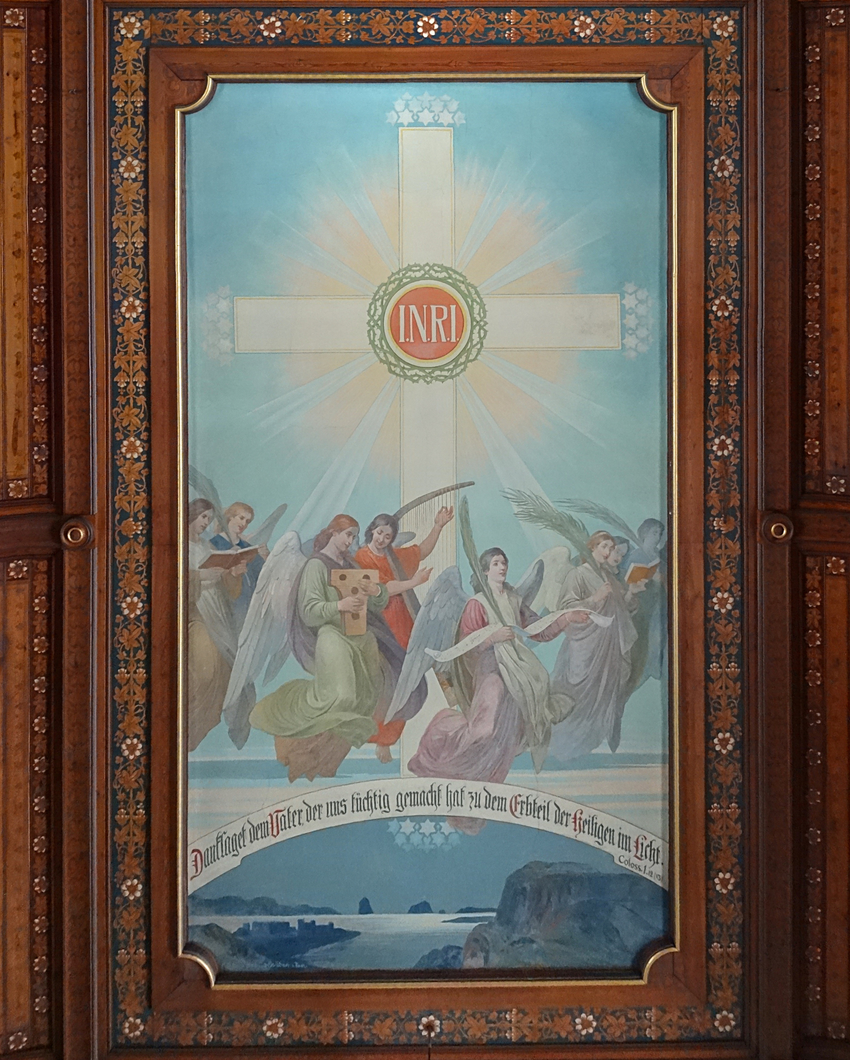 Deckenbild in der Dorfkirche Hörnitz